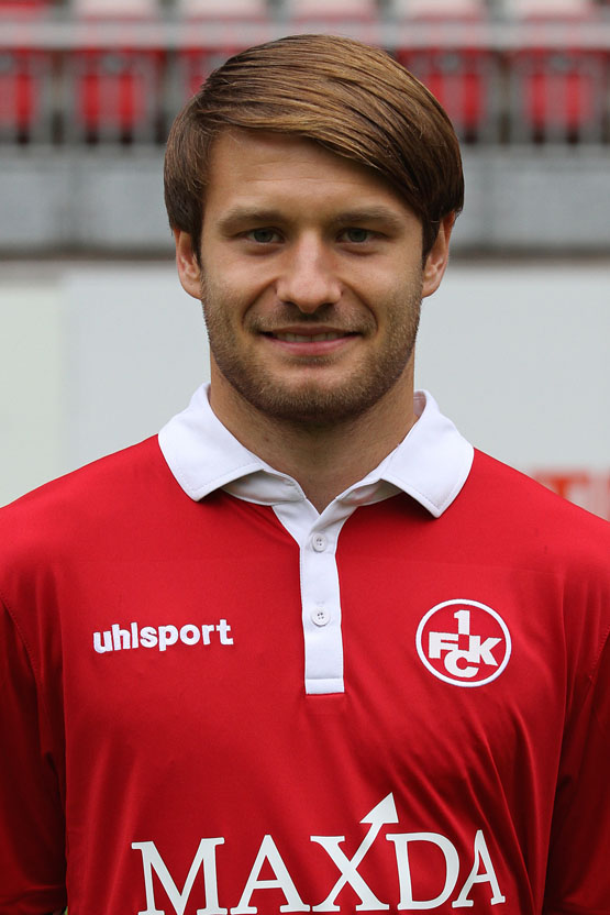 Daniel Halfar